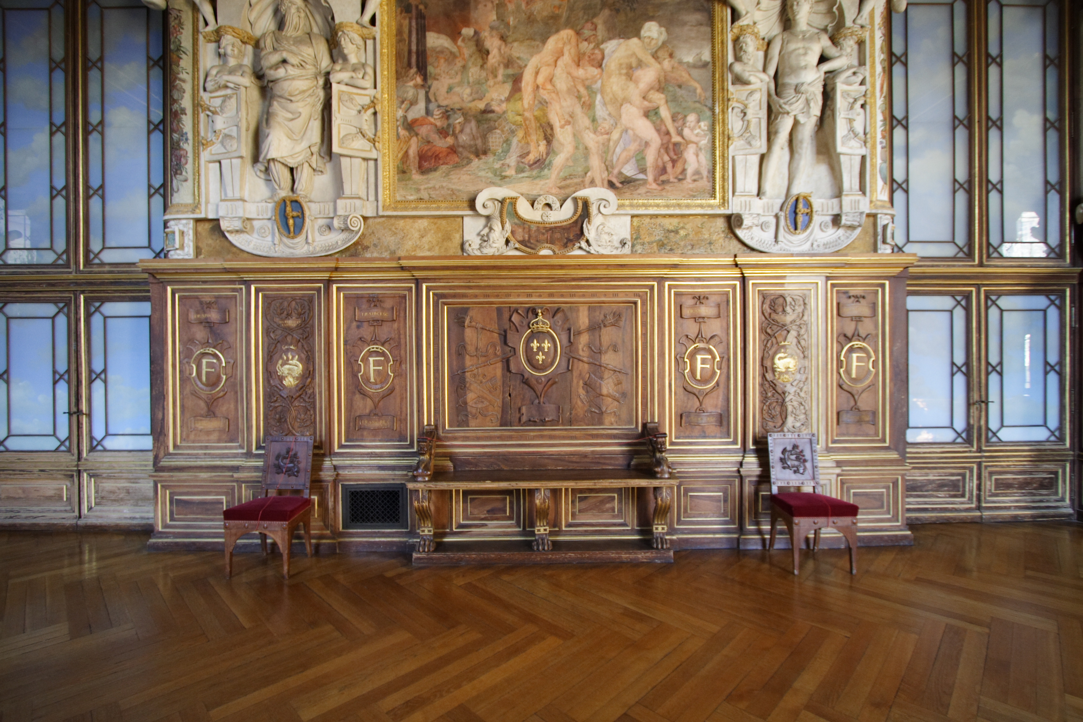 Château de Fontainebleau(Fontainebleau, France)